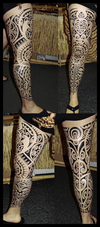 Jambe tatouée par Manu Farrarons. Création à main levée.